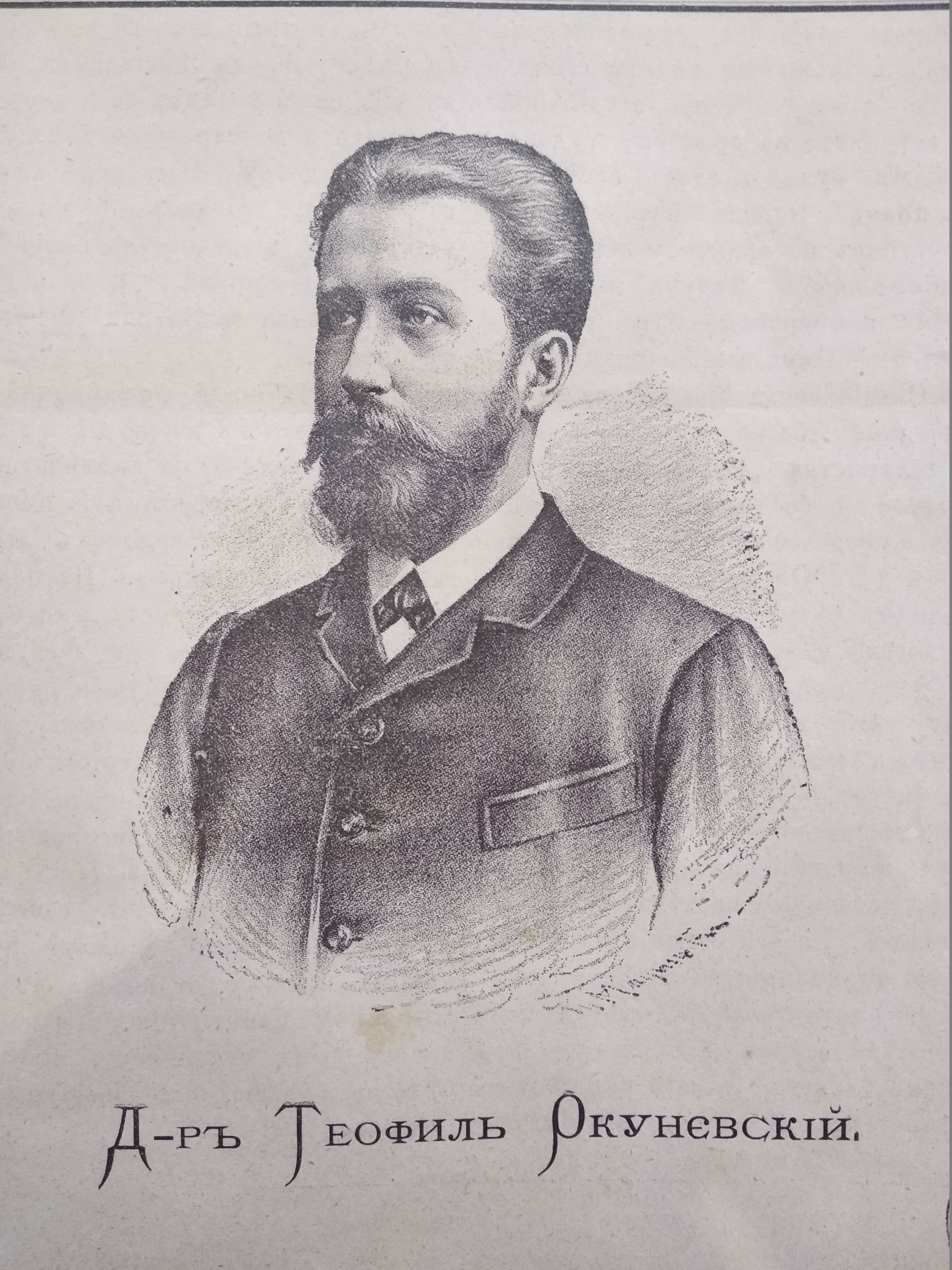 Фото з газети "Бітьківщина" за 1890 р.